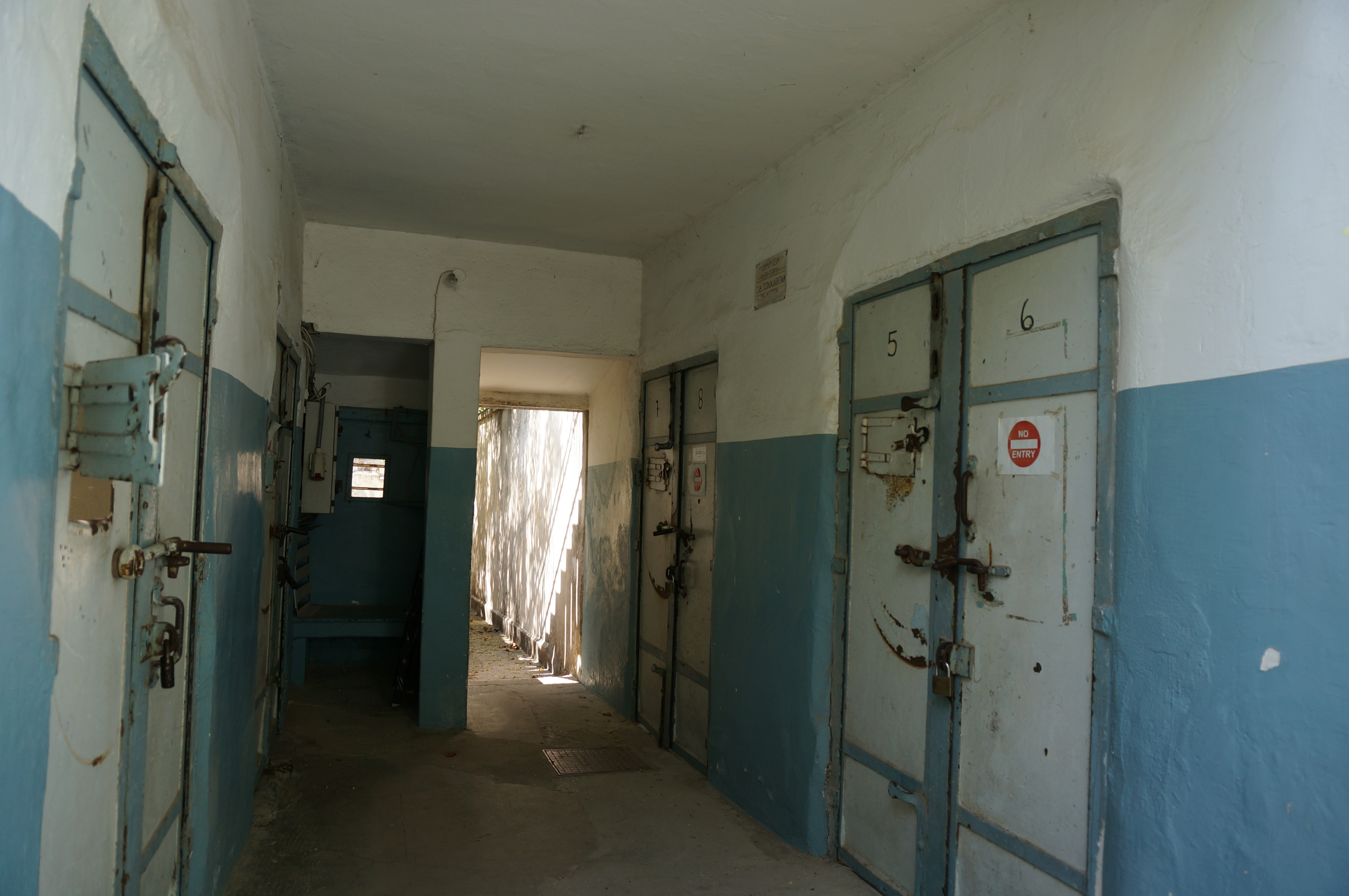 dans la ville de Salonique.